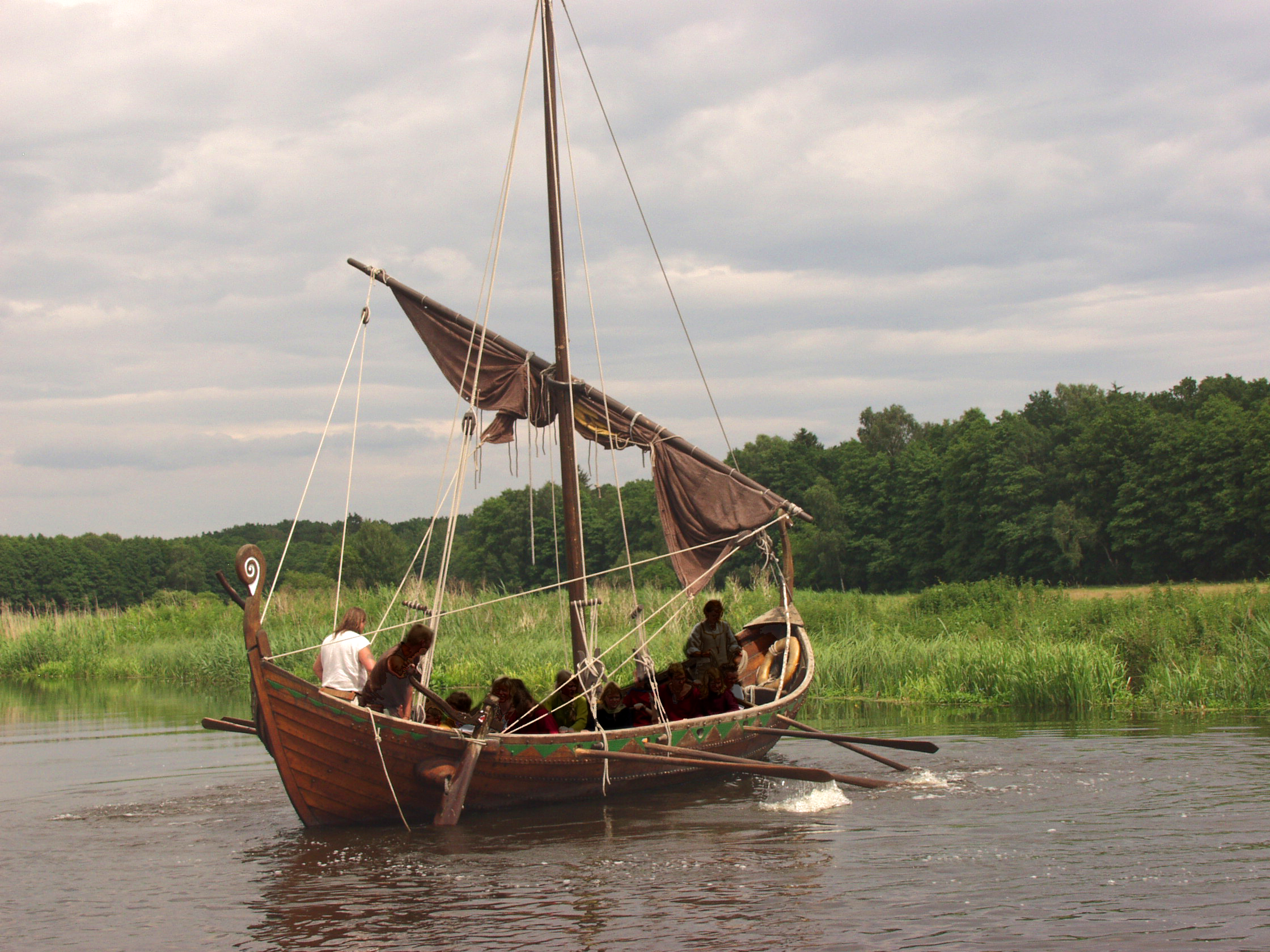 Slawenschiff "Svantevit" im Freilichtmuseum Ukranenland